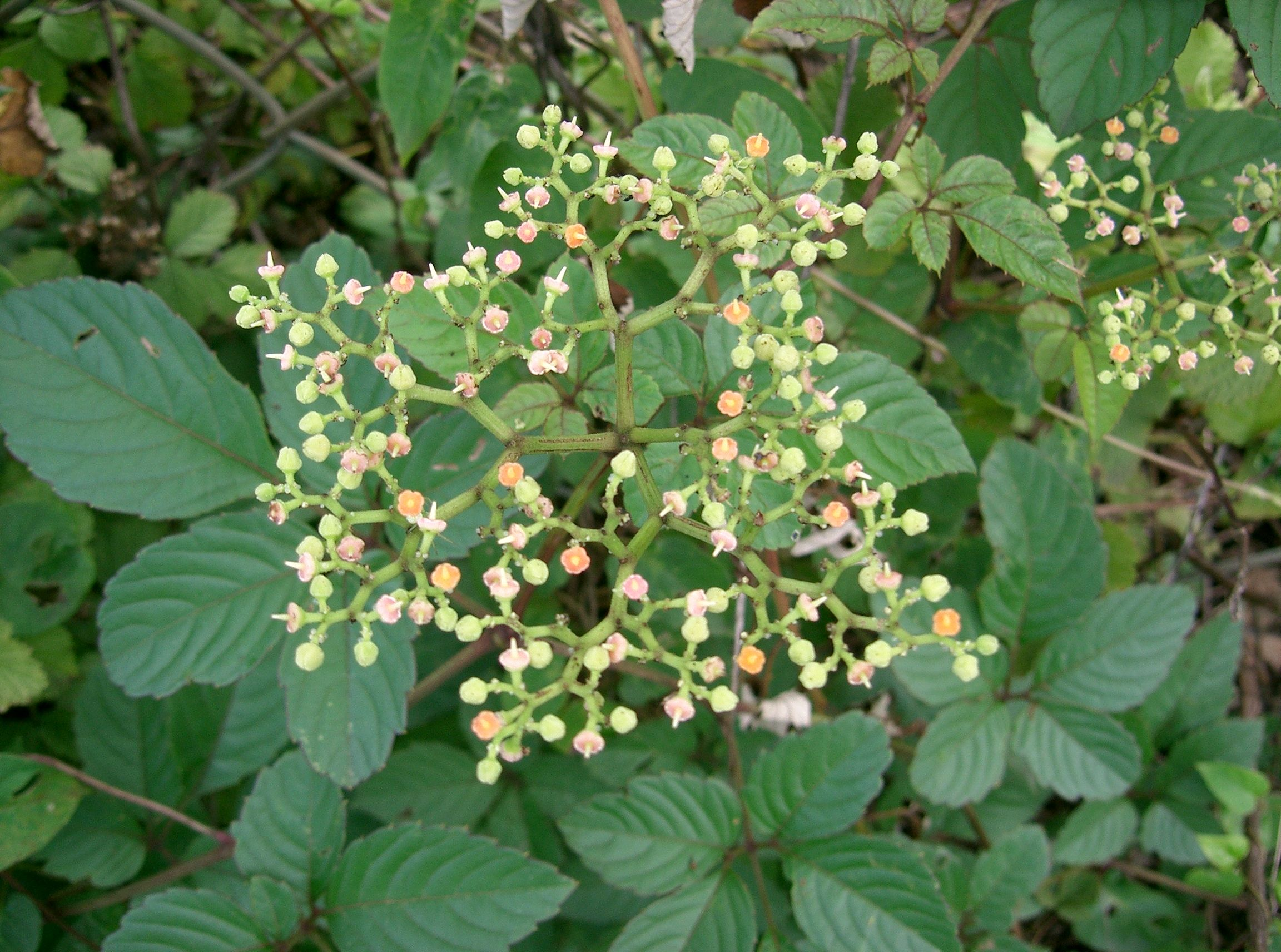 Scientific name Cayratia japonica